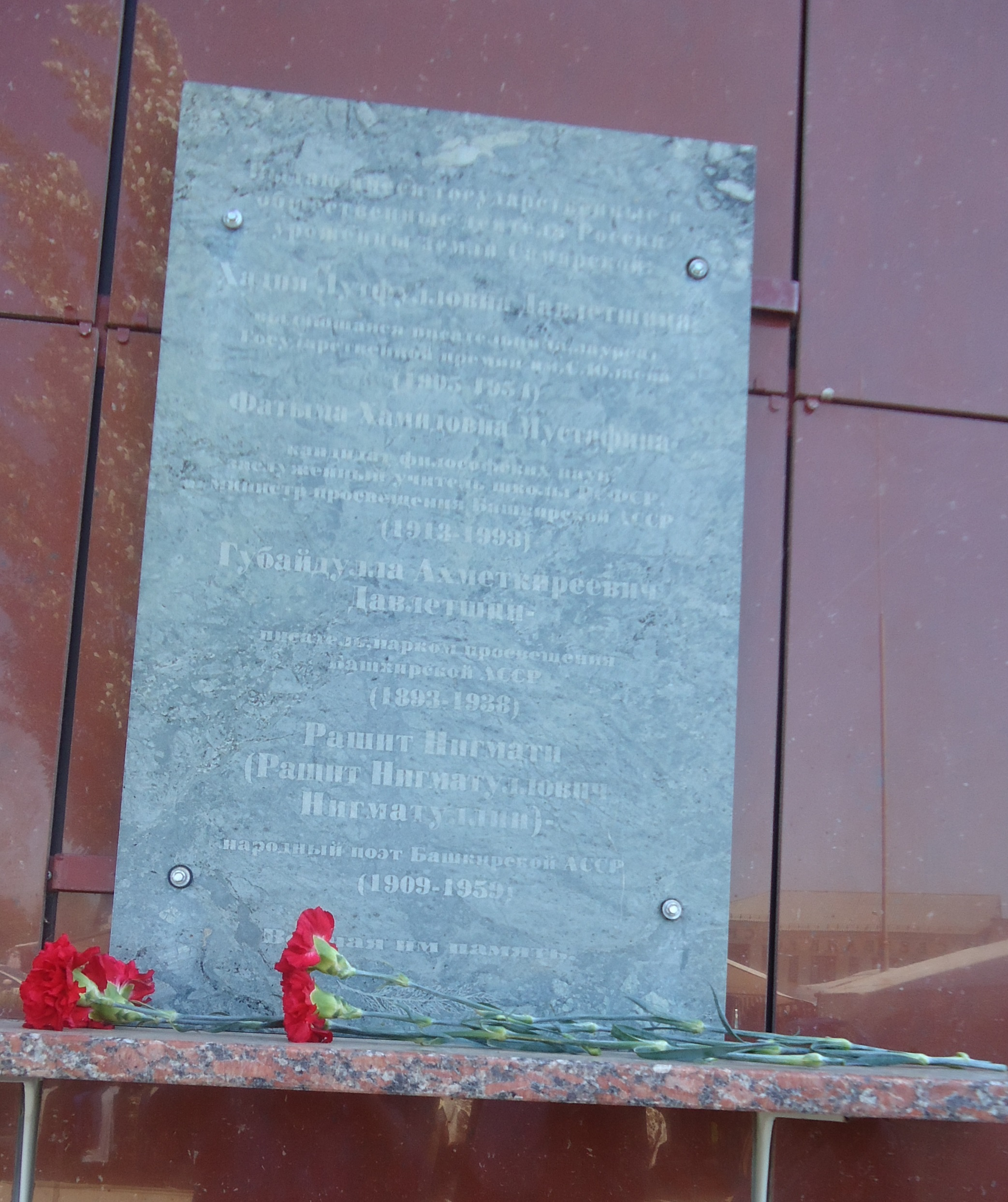 В Большой Черниговке мемориальная доска писателям доска. Самарская область